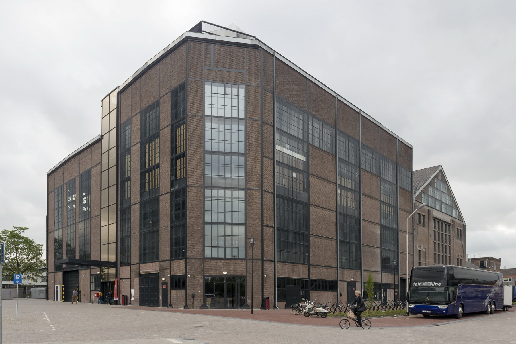 Cultuurcentrum Energiehuis, TenBrasWestinga, foto: Christiaan de Bruijne